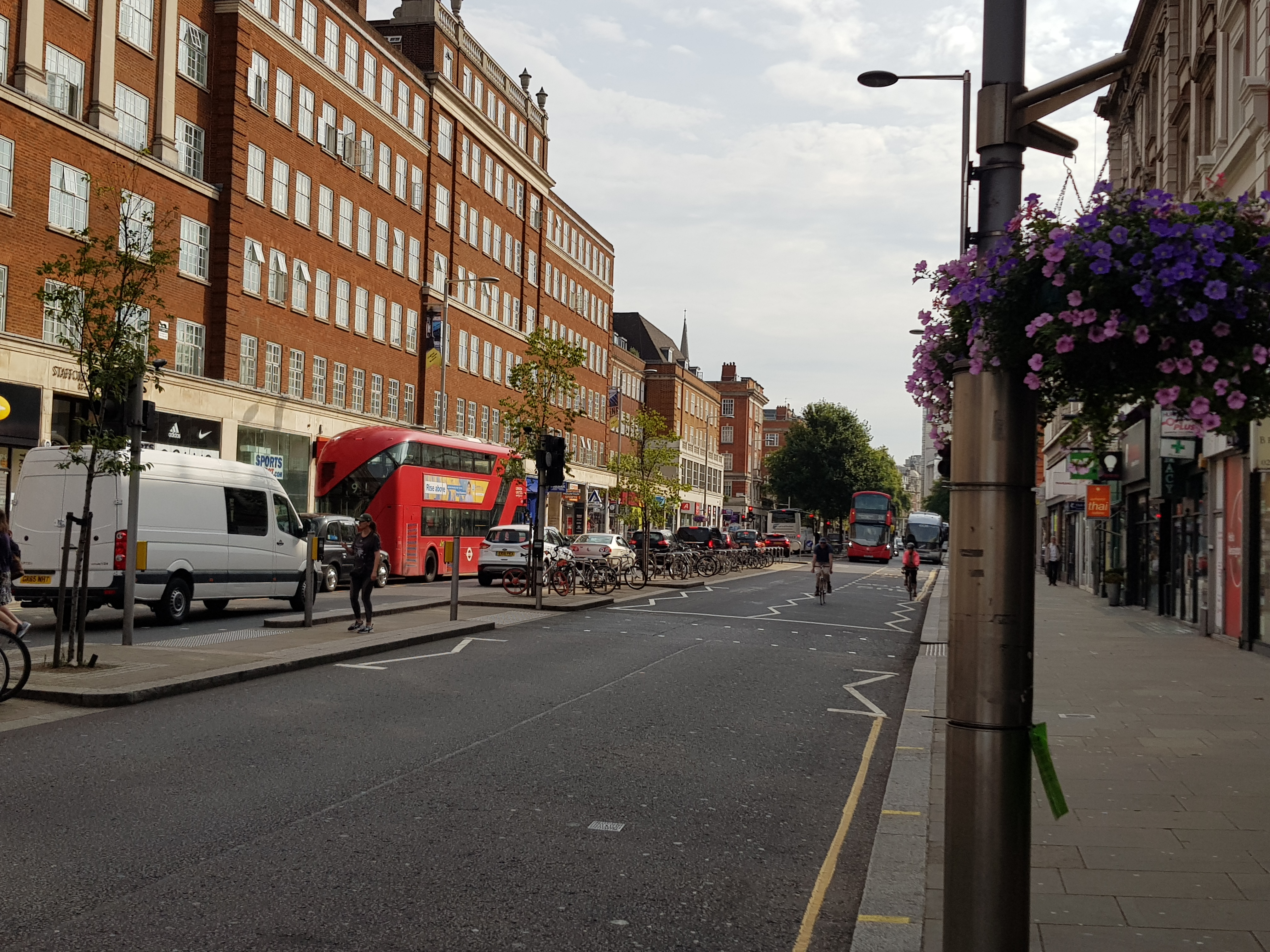 Kensington High Street, Londres.